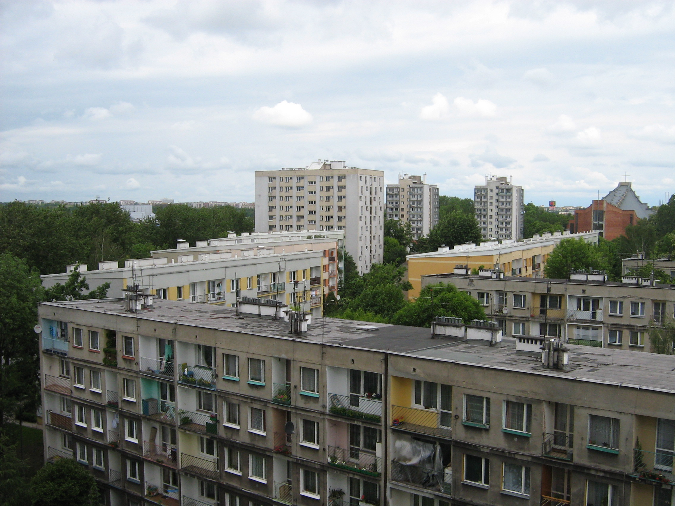 Wschodnia część Dąbia, widok na Kościół św. Stanisława